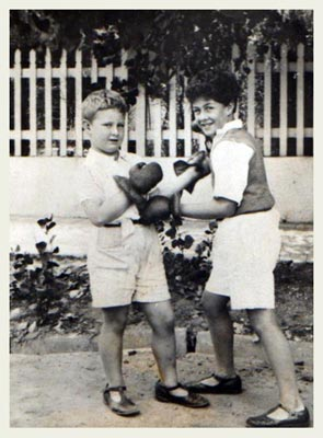 Con mi hermano